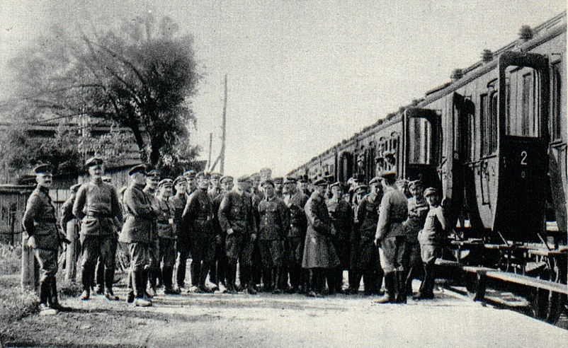 Odjazd oficerów z Ostrowi Mazowieckiej do Polskiego Korpusu Posiłkowego, do Przemyśla.